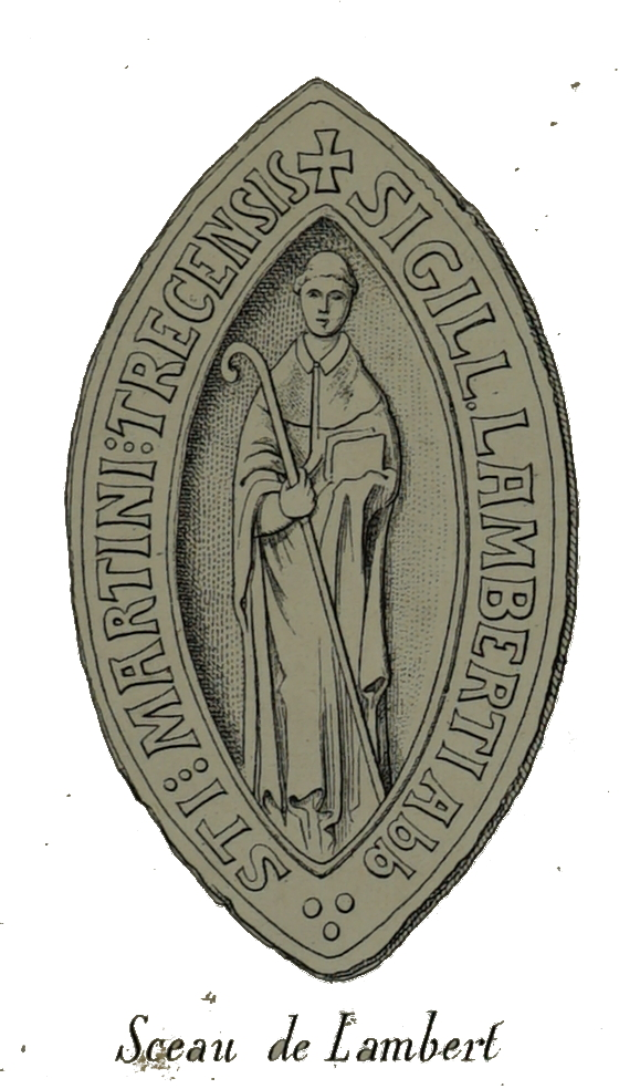 de l'abbaye